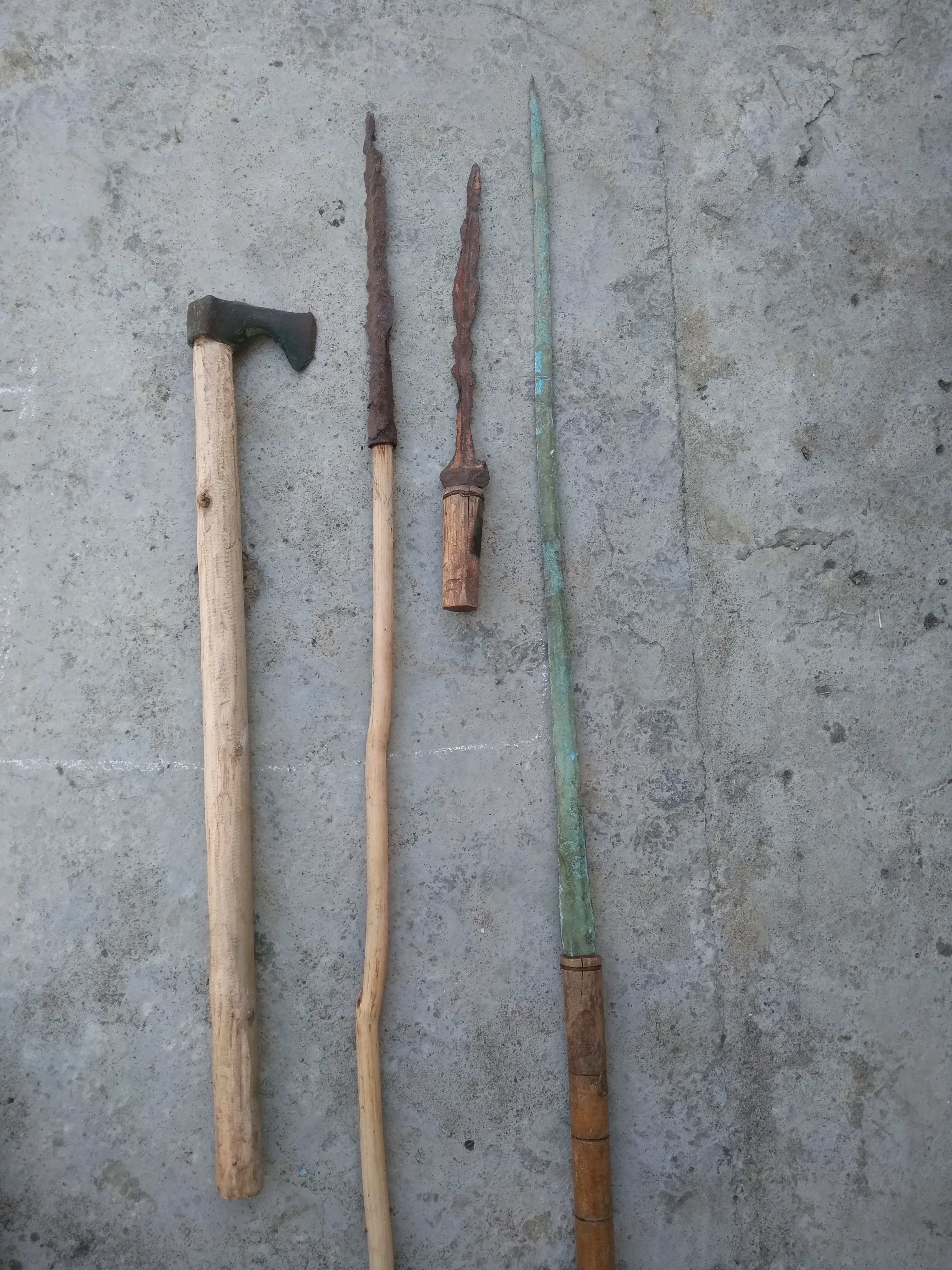 Azərbaycan Respublikasının Lənkəran rayonunun Şilavar kəndindəki Sığni ərazisindən tapılmış son tunc və dəmir dövrünə aid silahlar